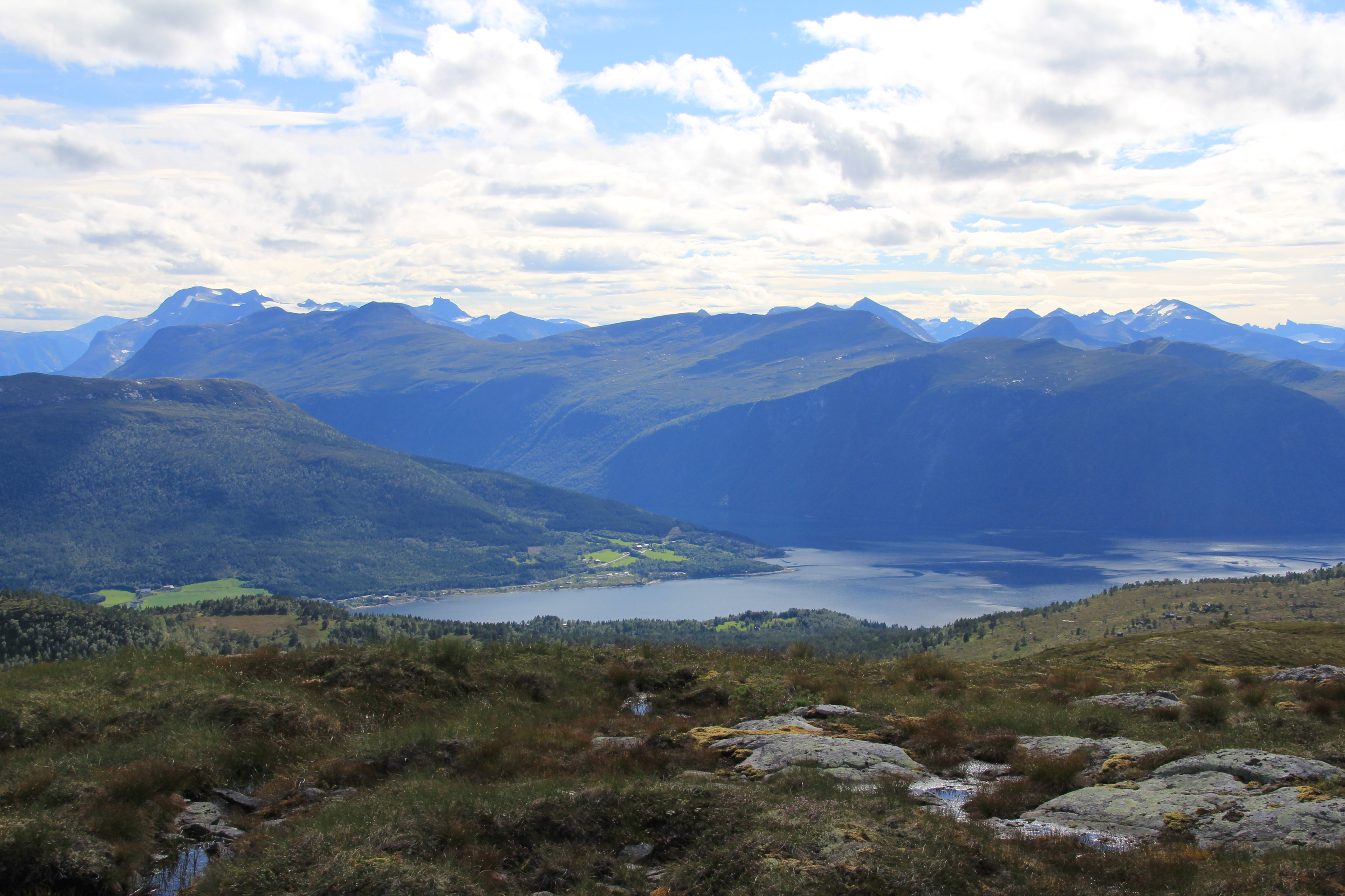 Utsikt til Nesset prestegård og Langfjorden fra Grønfjellet i Nesset kommune, Møre og Romsdal.